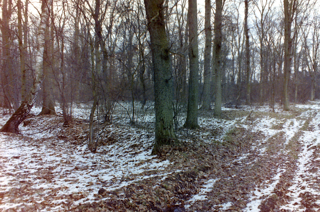 Wölbacker unter Wald bei Rühen, von einem Waldweg durchschnitten